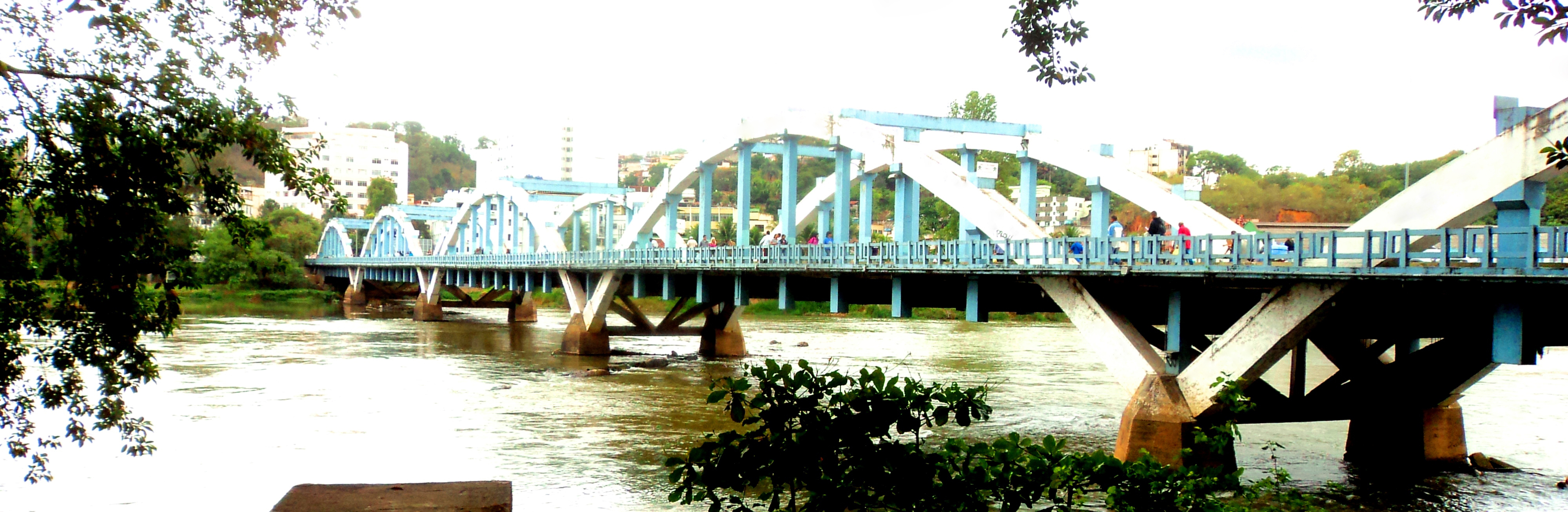 Ponte dos Arcos, em Barra Mansa, Rio de Janeiro, Brasil.